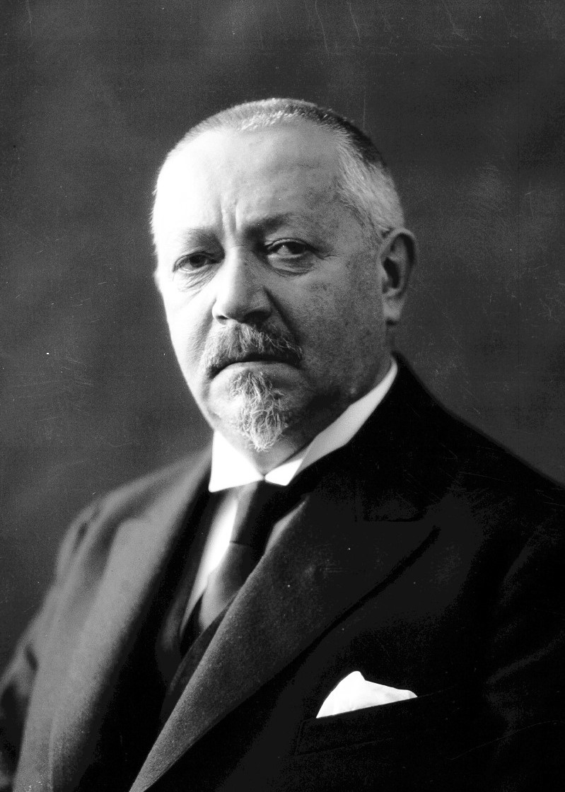 Johan Rønning (1862–1930), disponent i firma H.F. Klingenberg i Trondhjem.